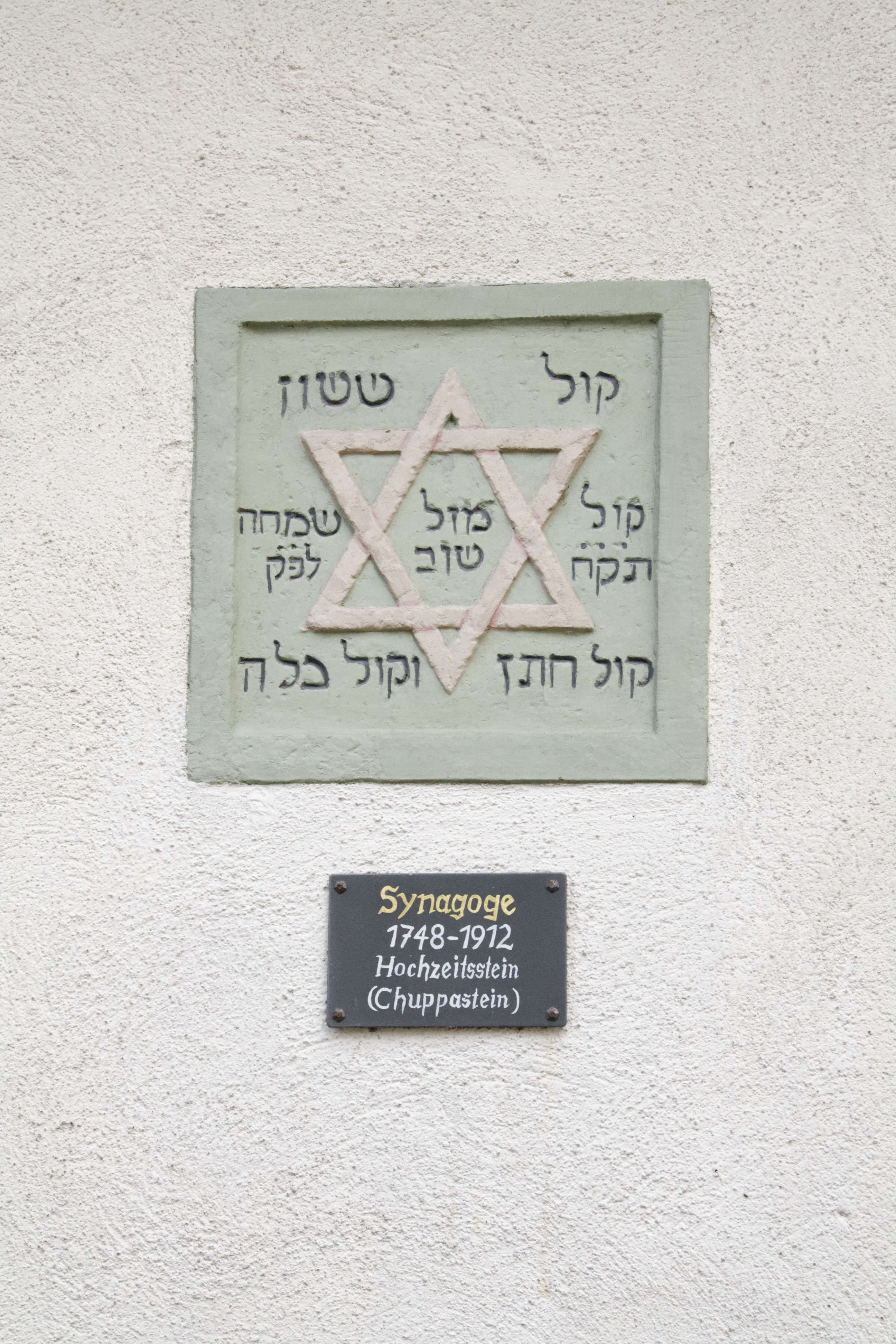 Obernbreit, ehemalige Synagoge in der Kirchgasse, Hochzeitsstein (Chuppastein) an der Nordmauer